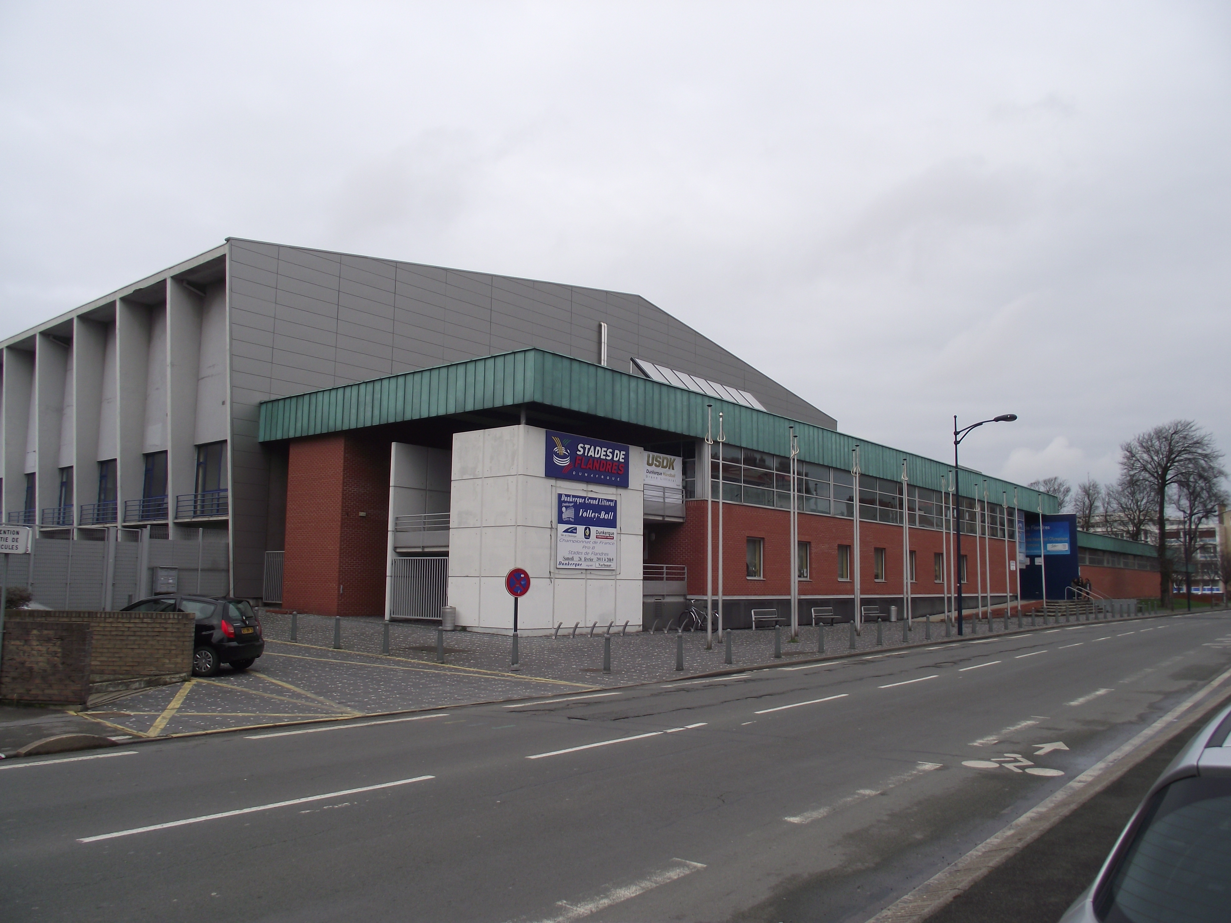 Le complexe sportif "Stades de Flandres" à Dunkerque